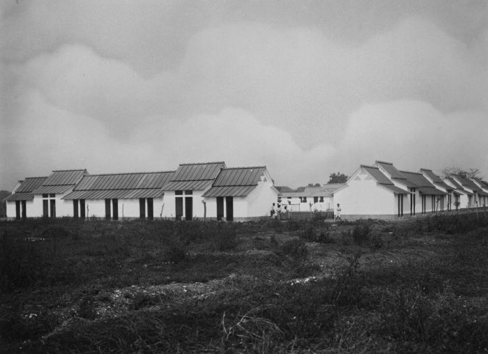 Foto. Soerabaja, Sidodadie, woningen voor contractarbeiders